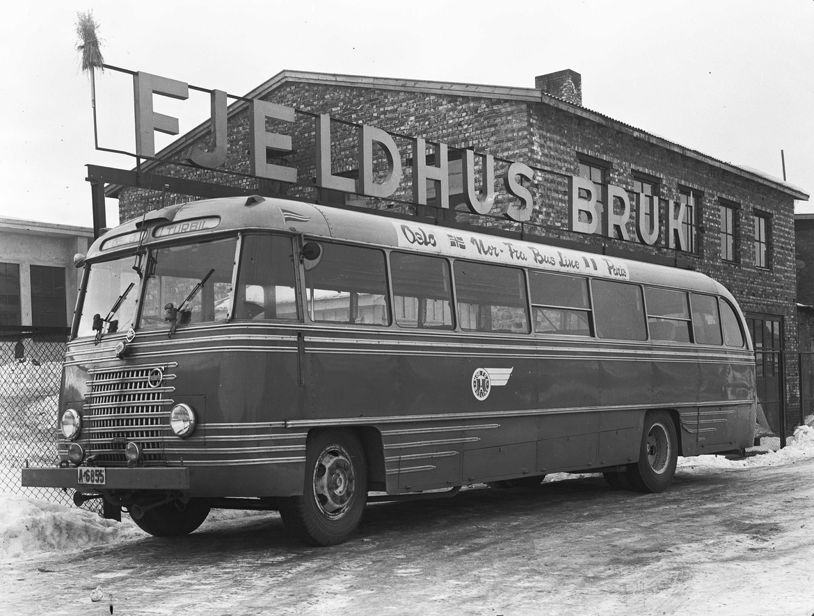 Fjeldhus bruk karosserifabrikk, med en ferdig Volvo buss, februar 1950